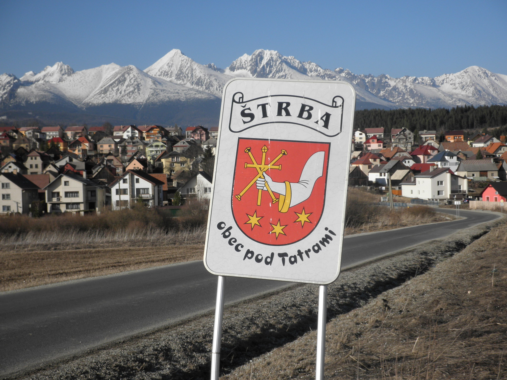 TABULA